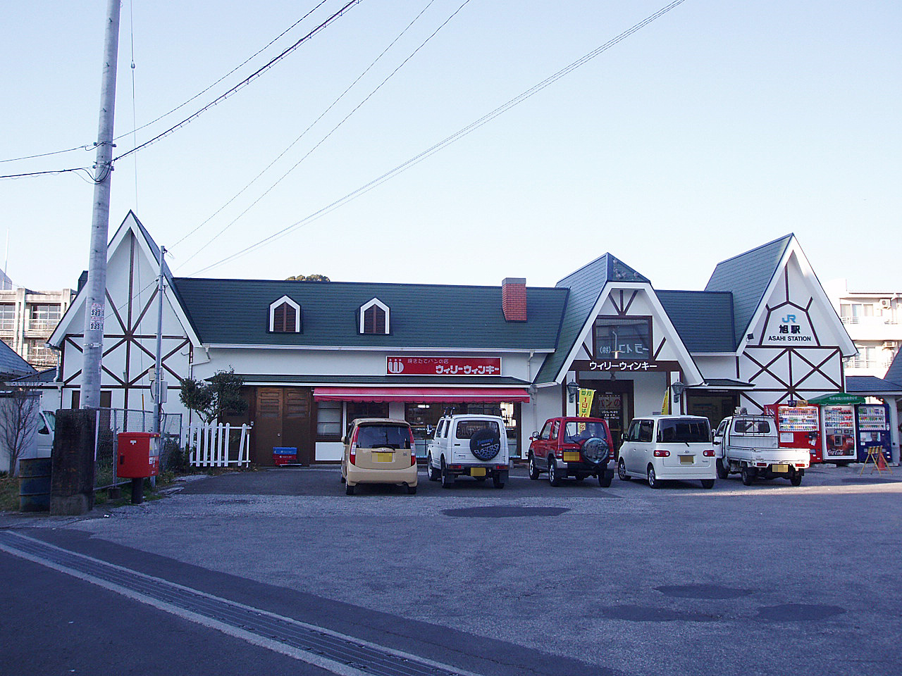 Shikoku Railway Dosan Line Asahi Station 四国旅客鉄道 土讃線 旭駅駅舎